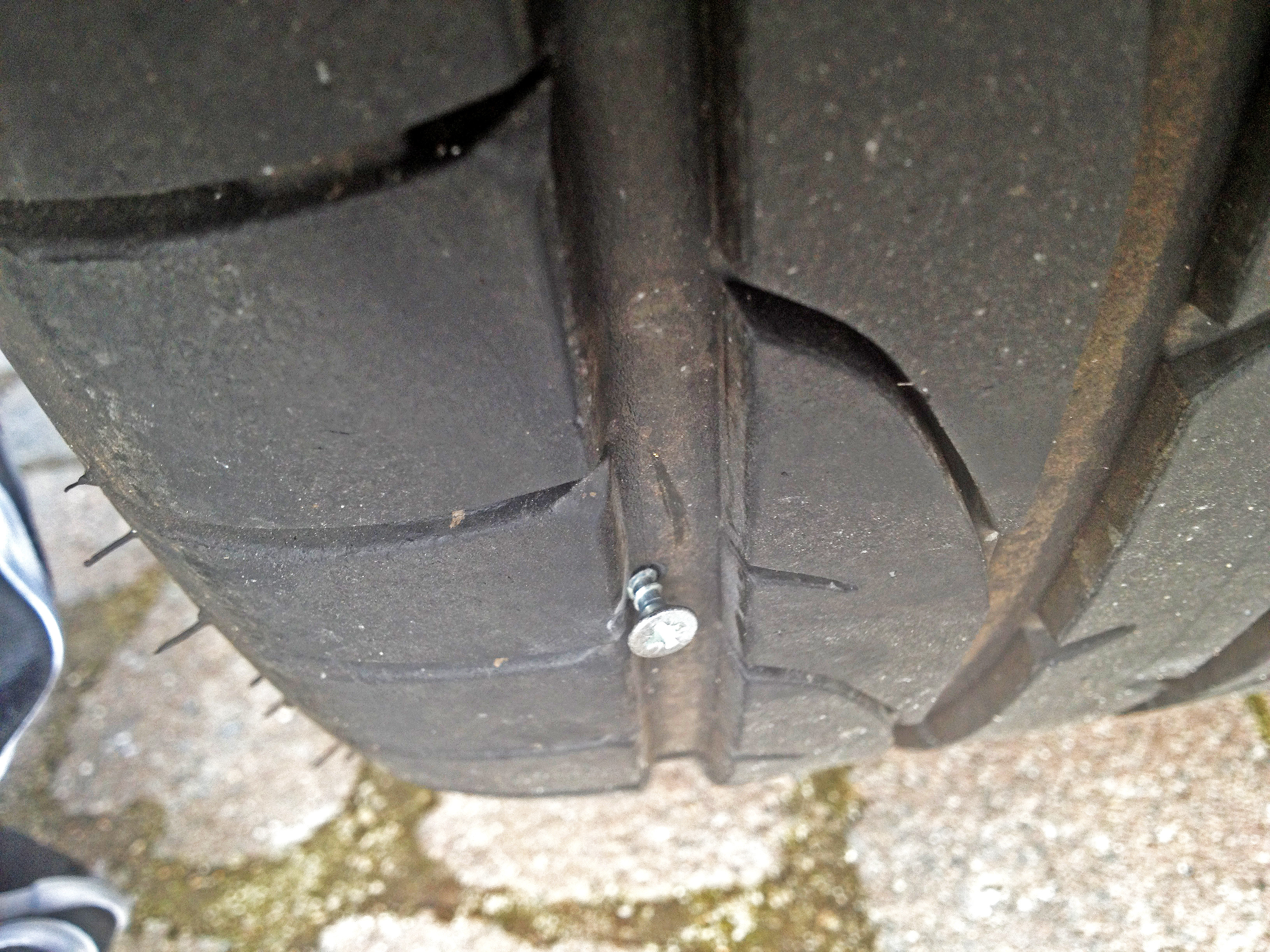 Schaden am Autoreifen durch eingedrungenen Fremdkörper (Schraube).